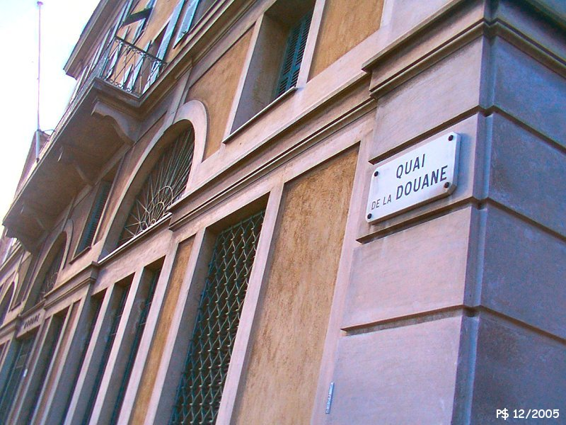 Le batiment des Douanes maritimes, quai de la Douane.